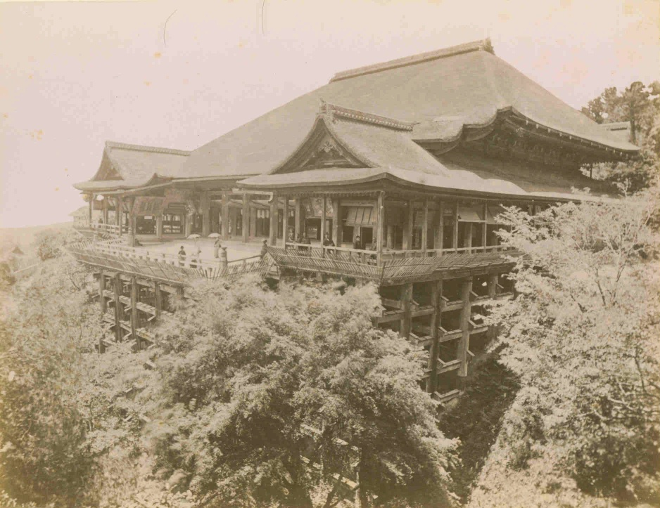 Fotograf: Adolfo Farsari (Nagasaki ID 4245). “Kiyomizu, Kyoto”. (einbelichteter Original-Titel). Kiyomizu-dera, Haupthalle (Kyoto). Schwarzweißes Albumin-Foto ca. 1880 (es wurden bei diesem Abzug eine Hausspitze und ein Baumwipfel entfernt). Foto: 19 x 24 cm quer (aufgezogen auf Karton: 27 x 35 cm quer).